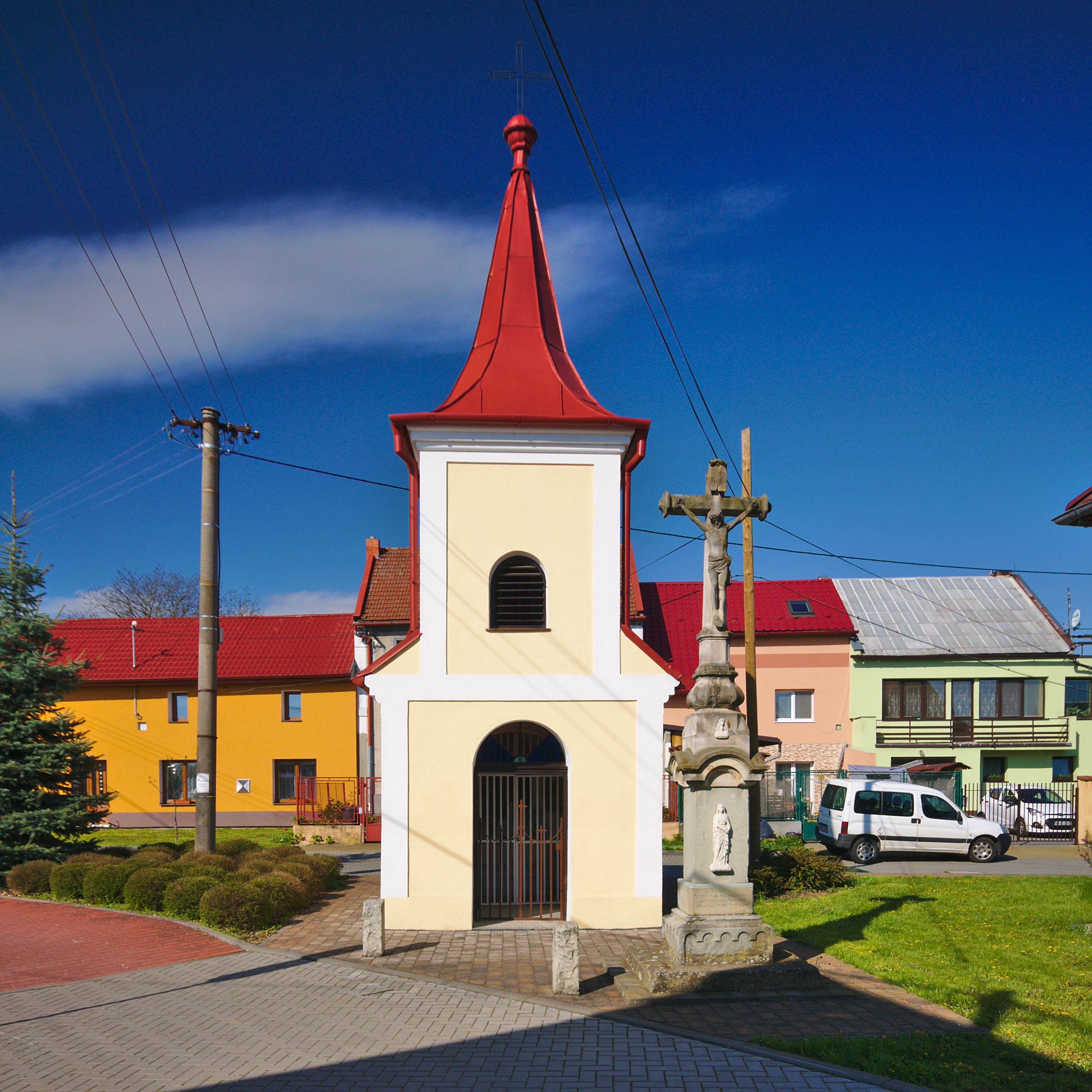 Kaple, Dlouhá Ves, Vrchoslavice, okres Prostějov